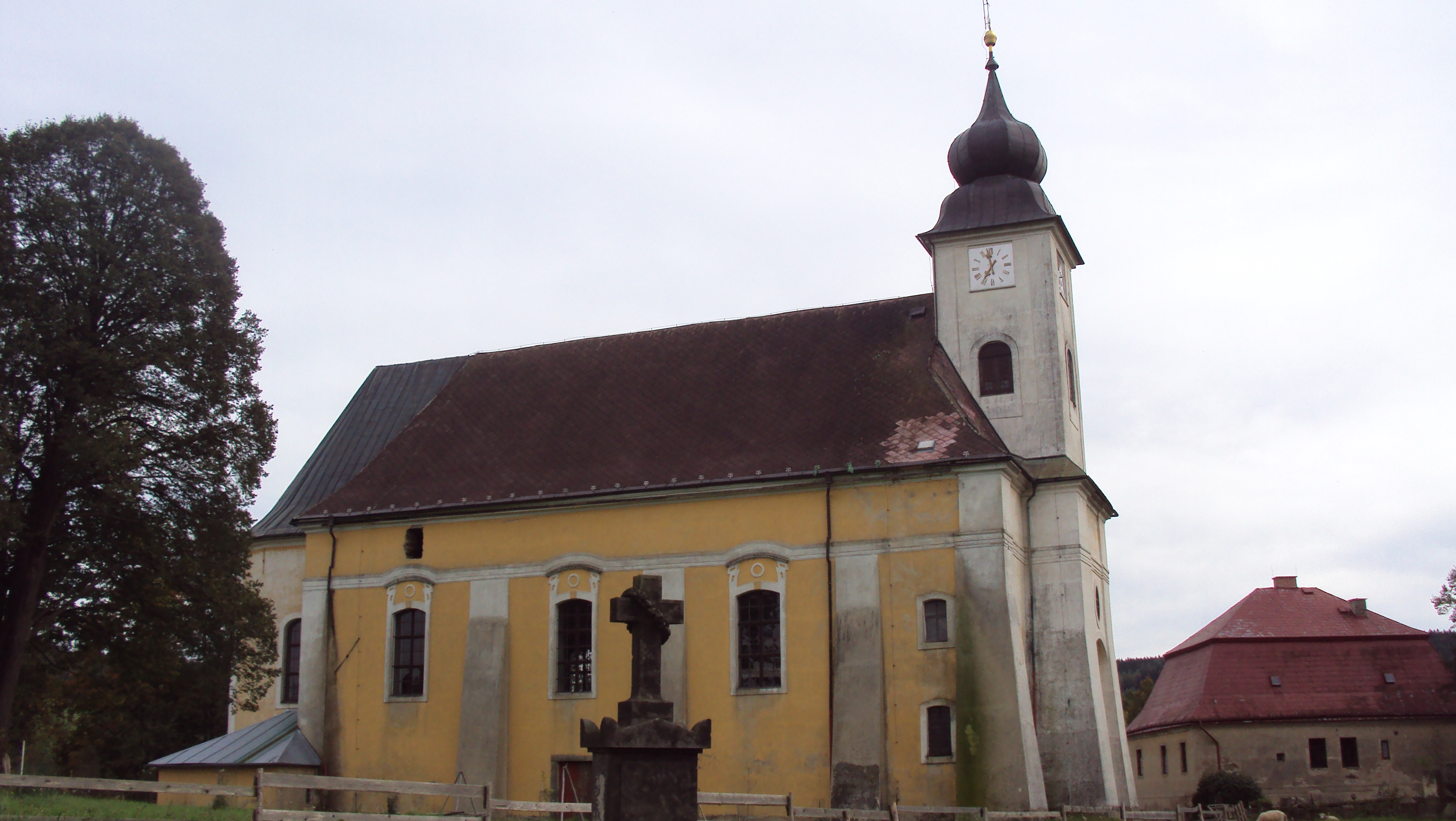 Kostel Navštívení Panny Marie, Lobendava.